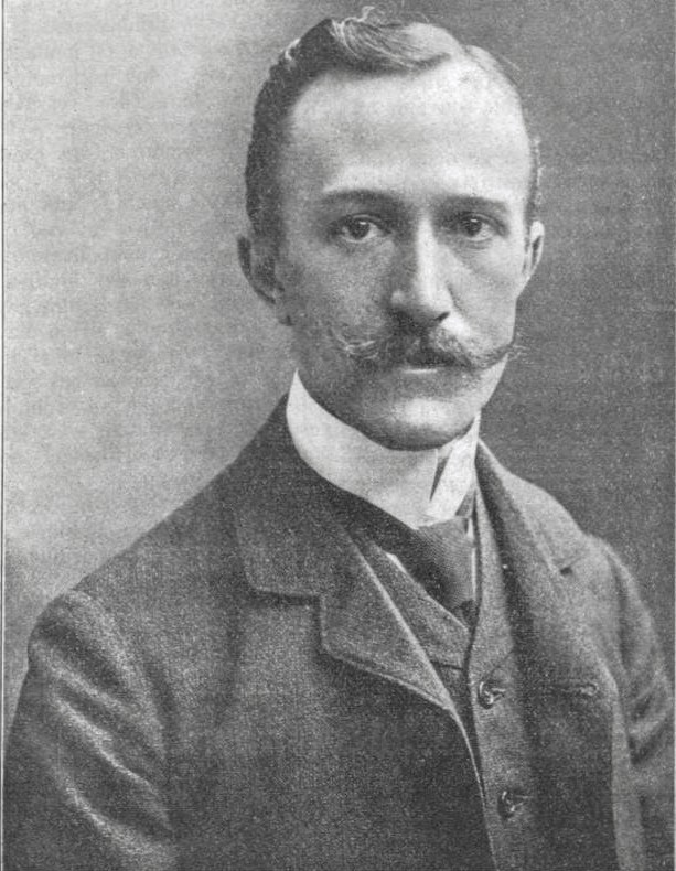 De nieuwe burgemeester van Leeuwarden mr. J.A.N. Patijn